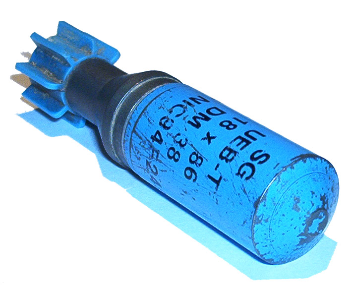 Übungsmunition Panzerfaust 3 (Bundeswehr)All diese Übungssysteme für panzerbrechende Waffen beruhen auf dem Prinzip einer Unterkalibermunition, die aus einem in die Originalwaffe oder in einem Übungsgeschoß eingebauten Unterkaliberlauf verschossen werden. (